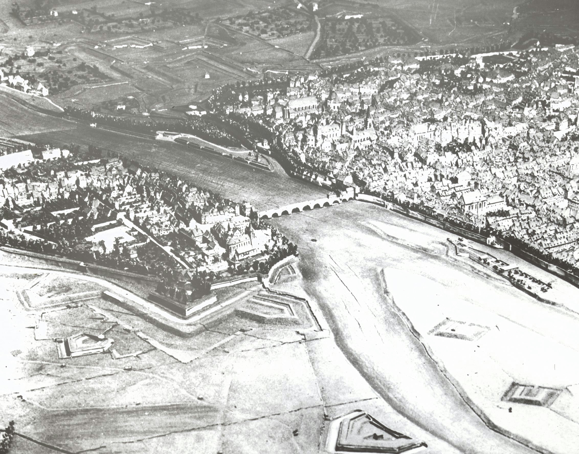 Exterieur OVERZICHT MAQUETTE VAN DE STAD